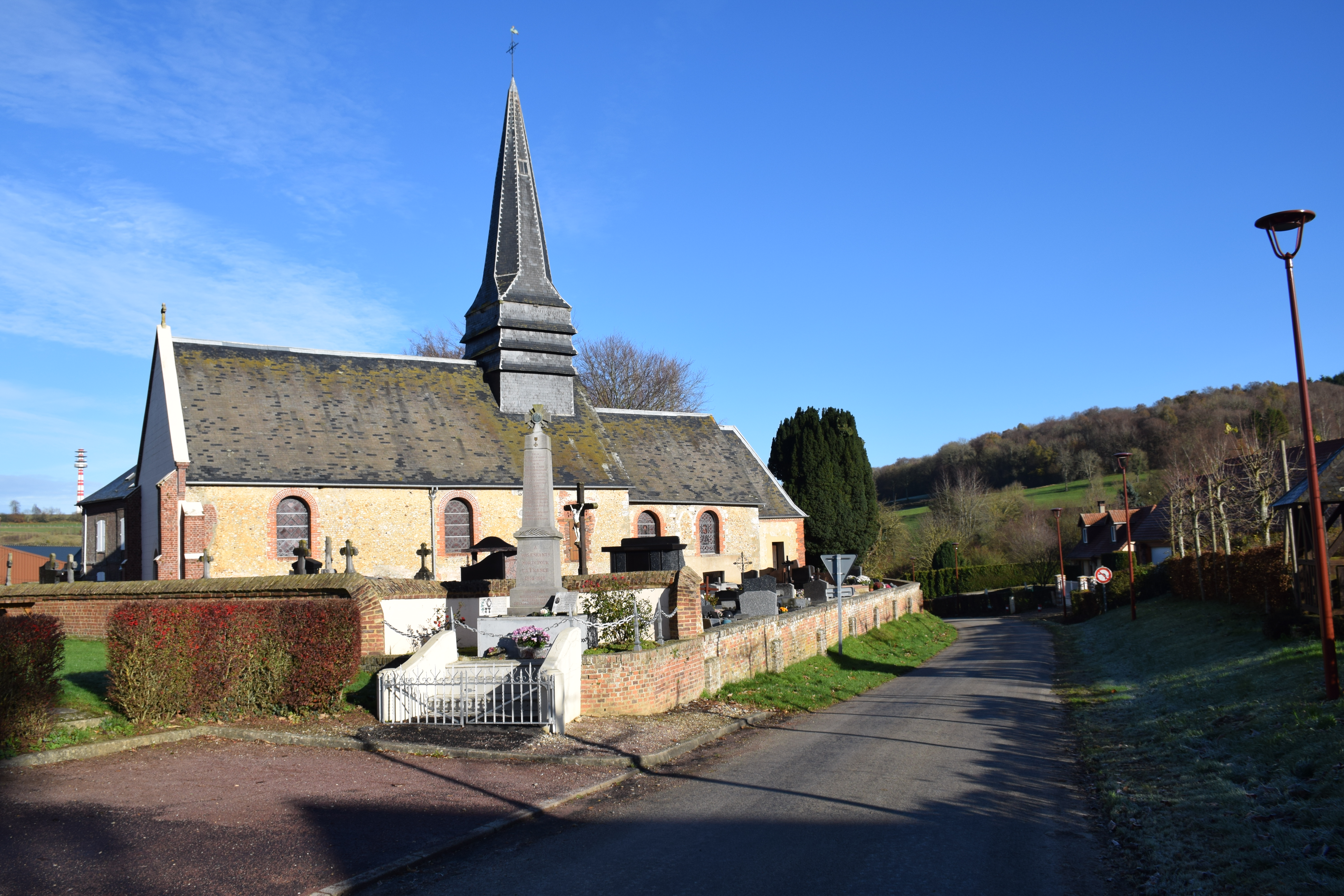 L'église